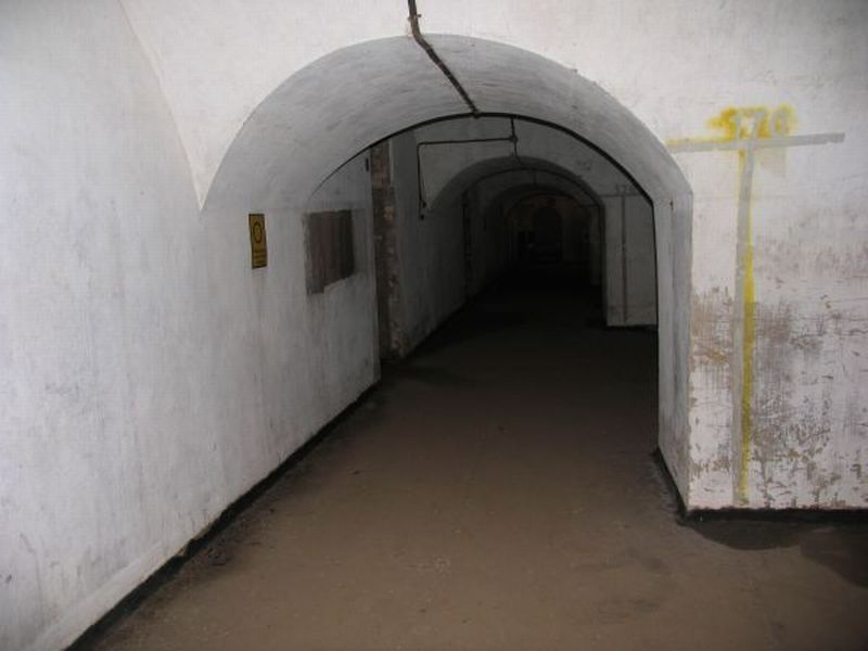 Tinghøj Batteri, belægningsgang